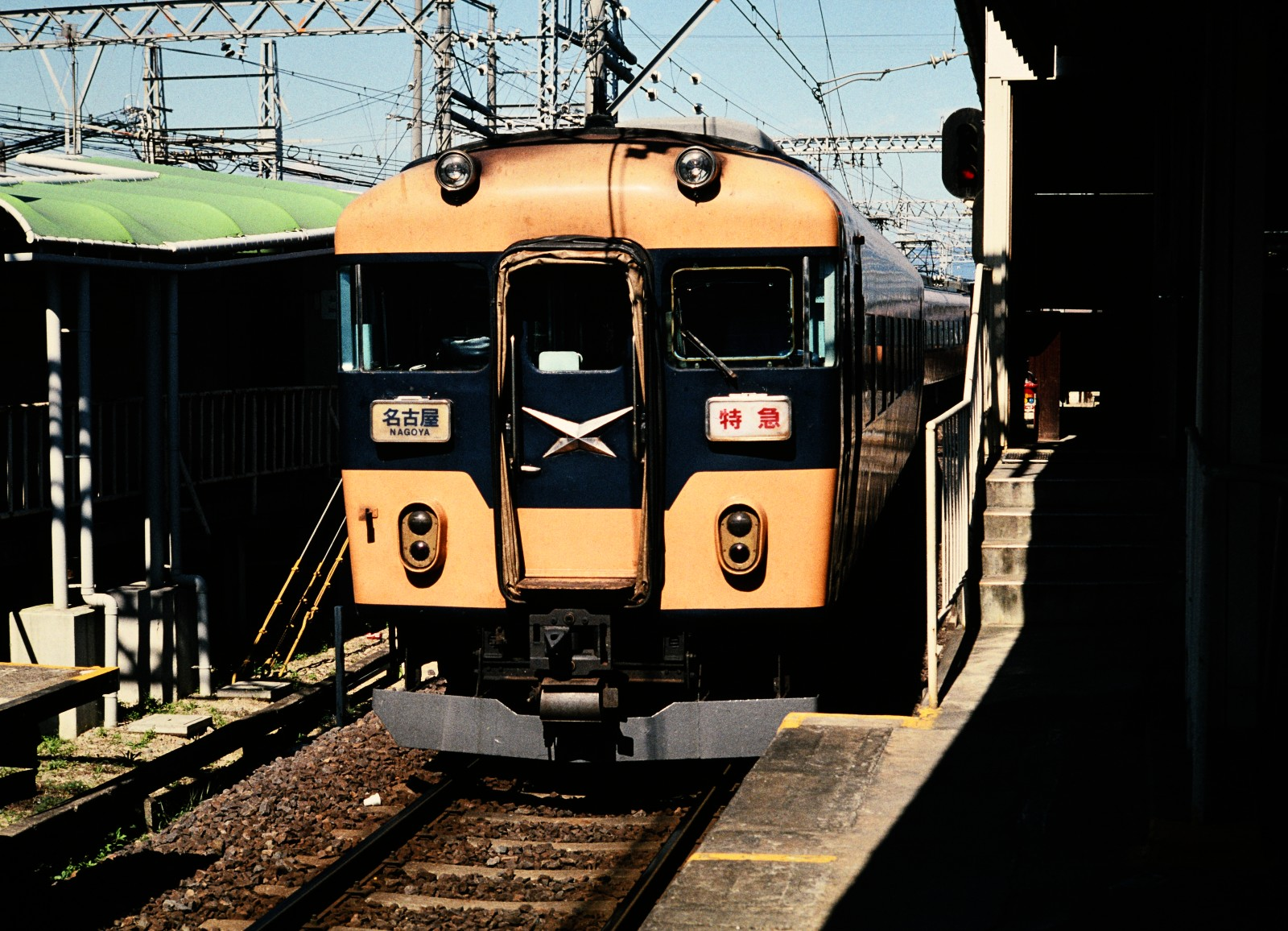 伊勢中川駅を発車する近畿日本鉄道名伊乙特急の10400系